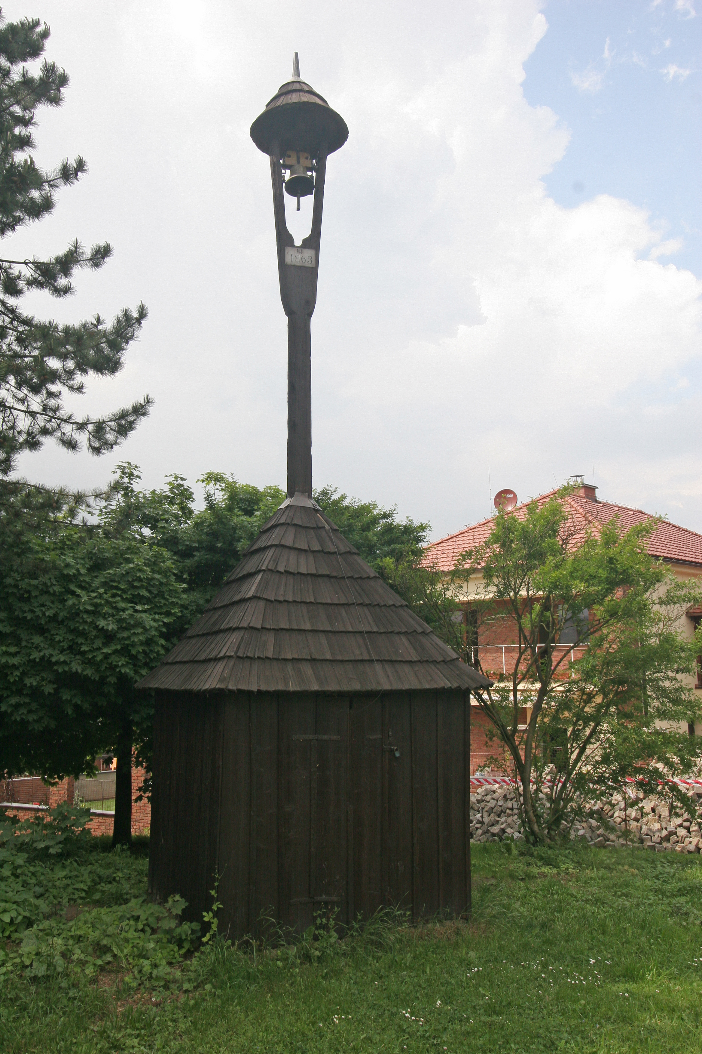 Zvonice (Rabštejnská Lhota), náves, Rabštejnská Lhota